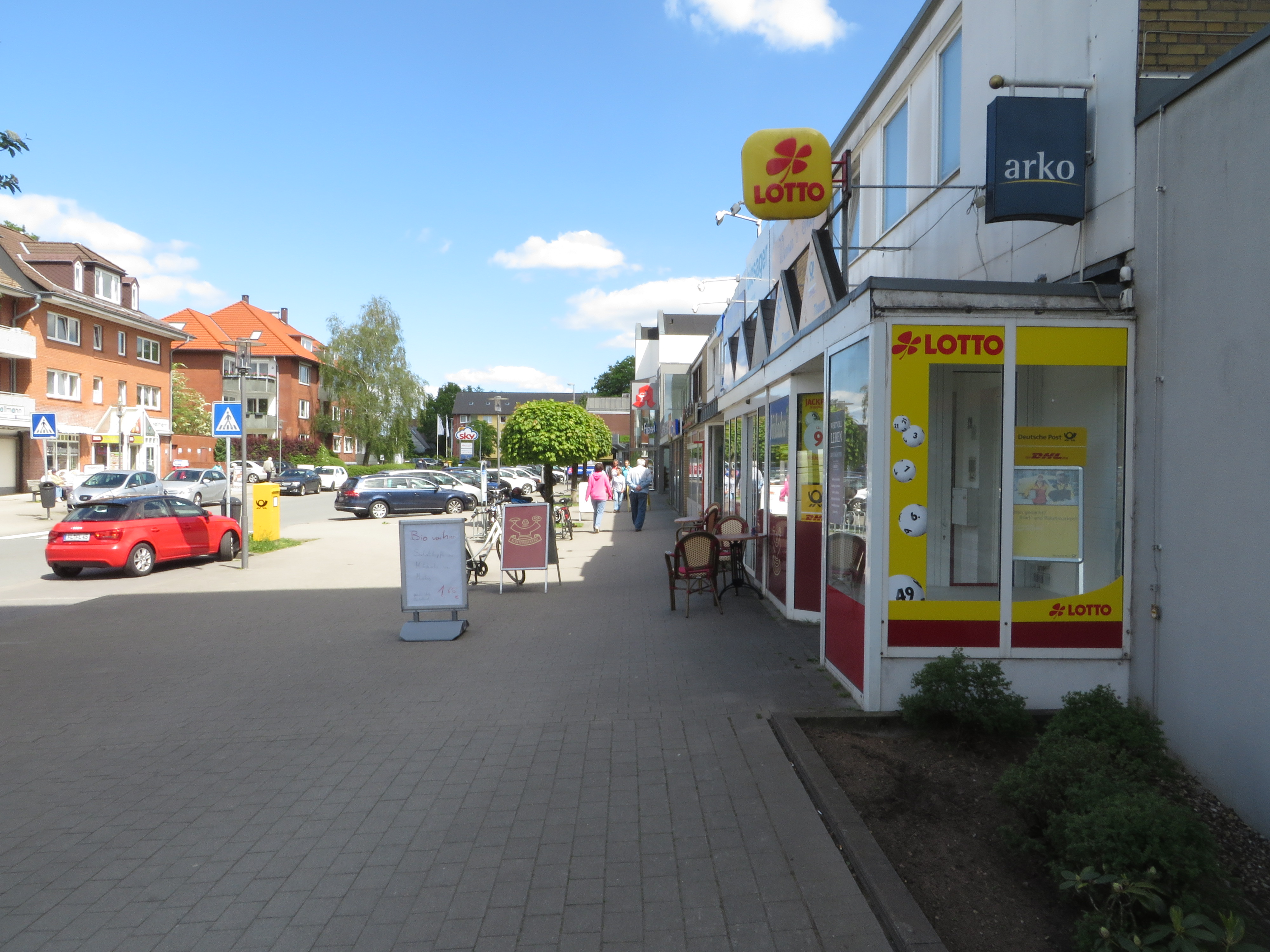 Twedter Plack, Flanierweg vom Marrensdamm (Flensburg-Mürwik, 4 Juni 2015), Bild 01